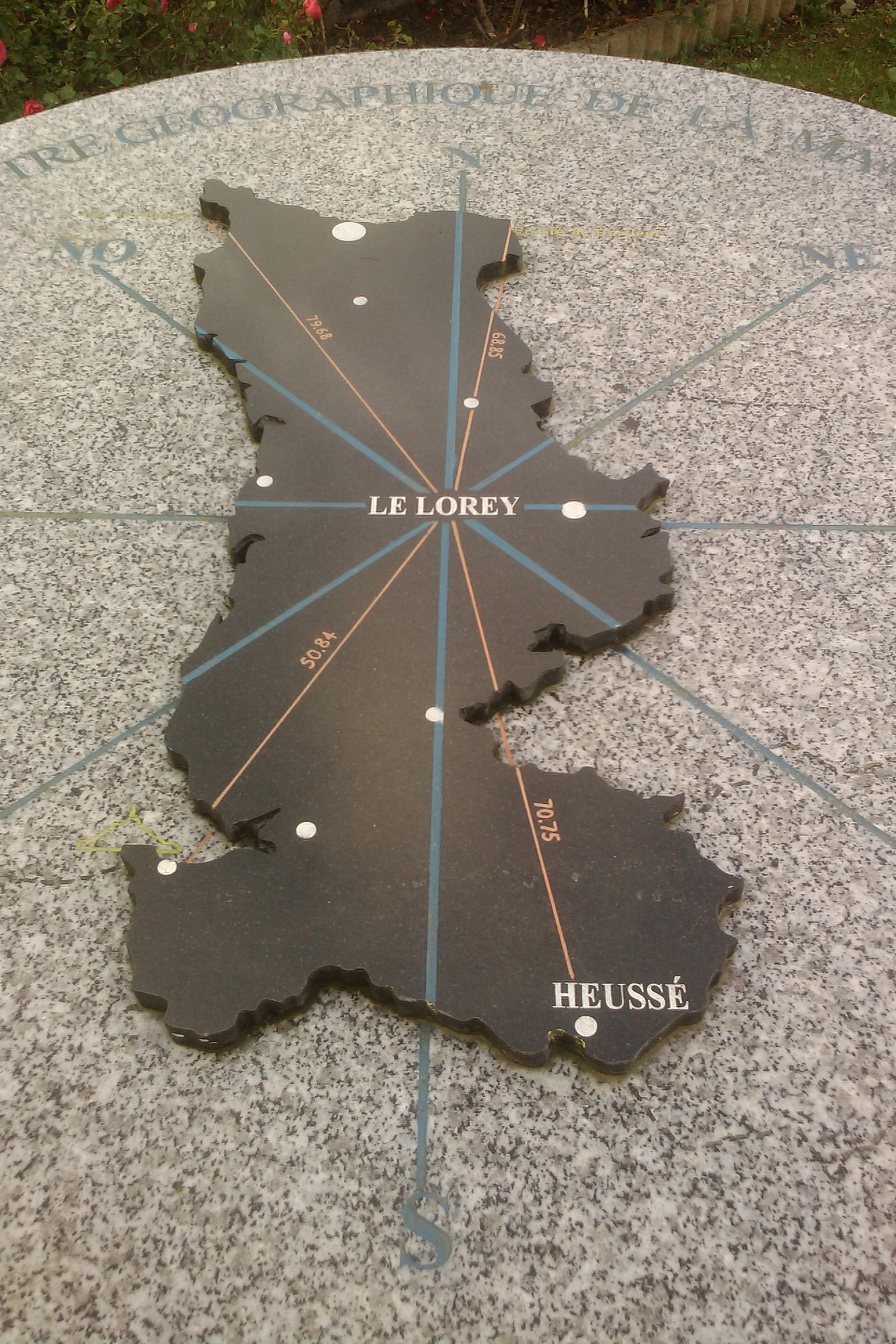 Le Lorey, centre géographique de la Manche